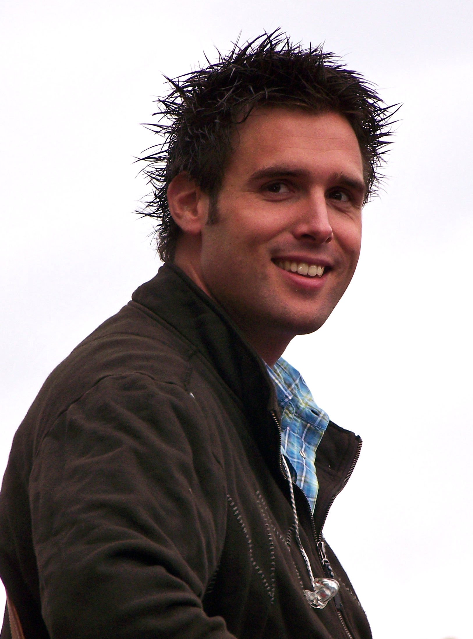 Nick Schilder tijdens een optreden van Nick & Simon, op het Koopmansplein in Assen in 2007